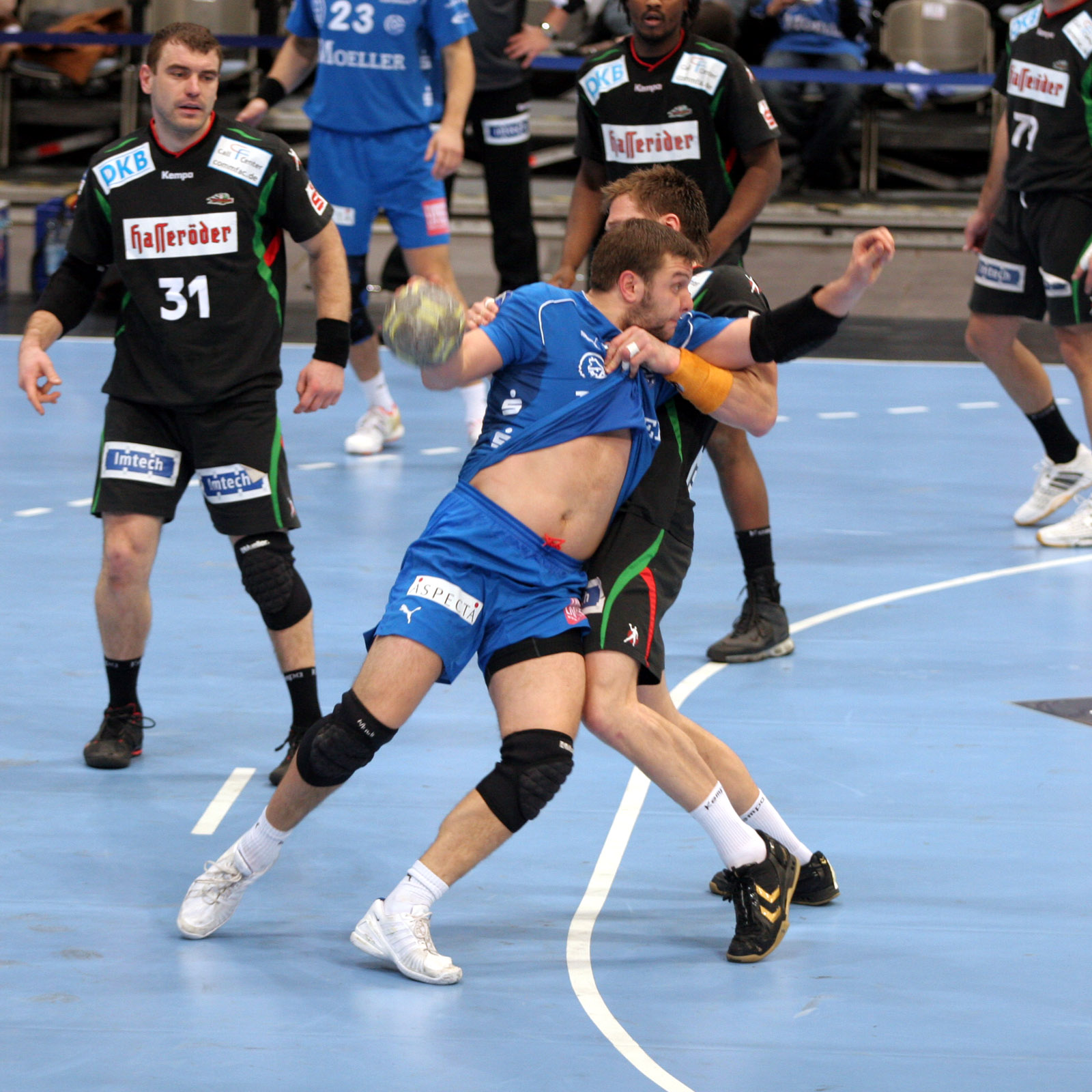 Szene aus einem Bundesligaspiel. Am Kreis Robert Gunnarsson, der gefoult wird. Bild Nummer 2 aus einer Serie von 6 aufeinanderfolgenden Aufnahmen. Am 19. November 2008 in der Kölner Lanxess-Arena